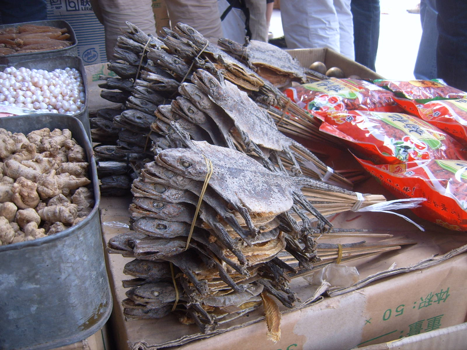 Some elements for Médecine chinoise in Xi'an